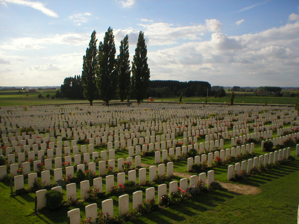 Den brittiska krigskyrkogården Tyne Cot med fallna från Slagen vid Ypres. Foto: Johan S 29 november 2006 kl. 20.55 (CET)